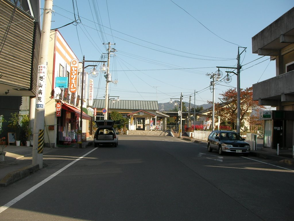 河南町、前谷地